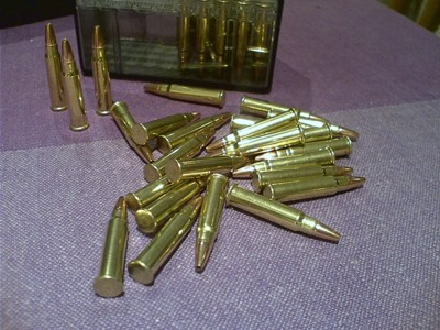 Náboj.17 HMR.